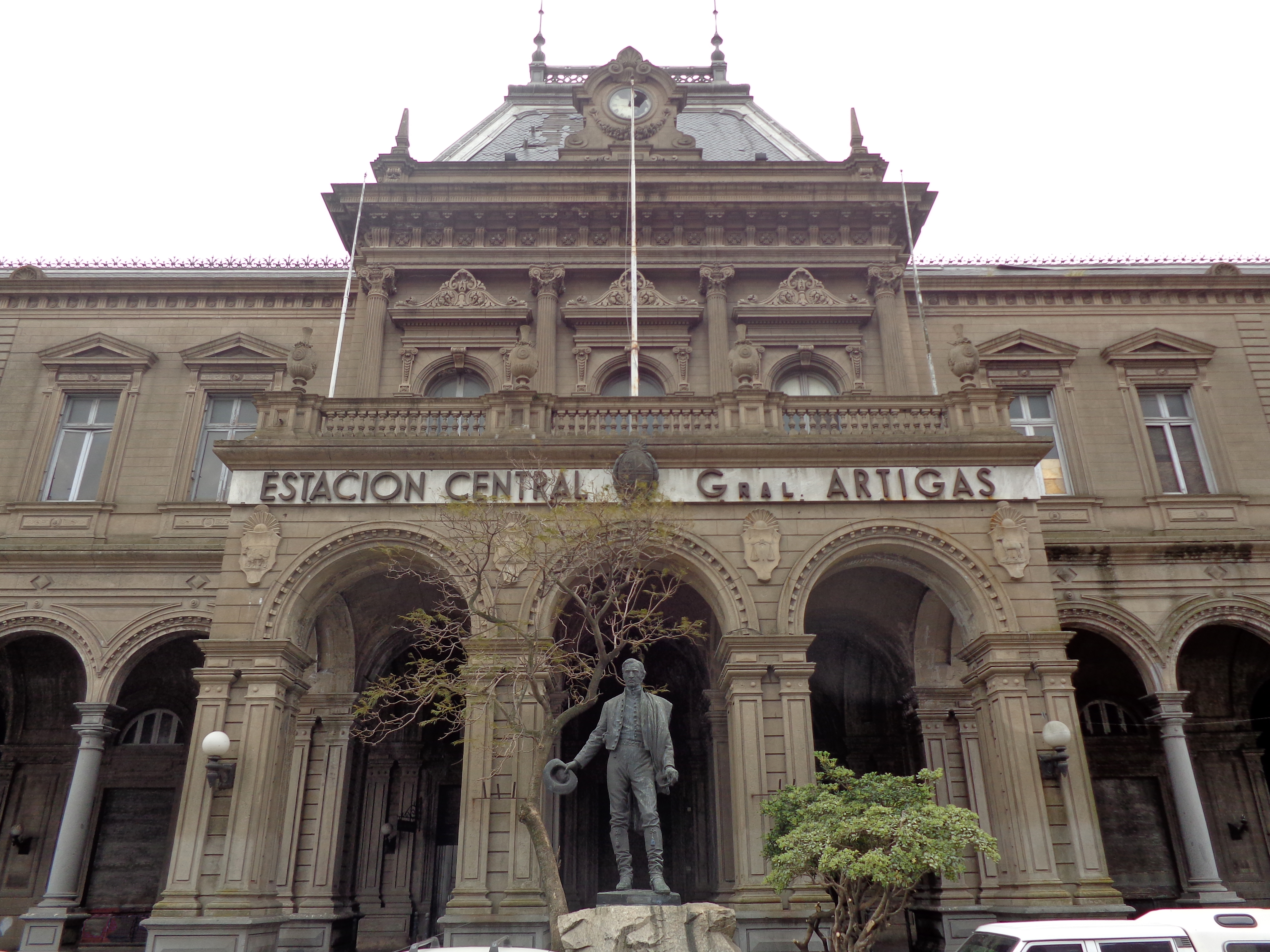 Estación Central de Ferrocarriles General Artigas. Ubicada en el departamento de Montevideo